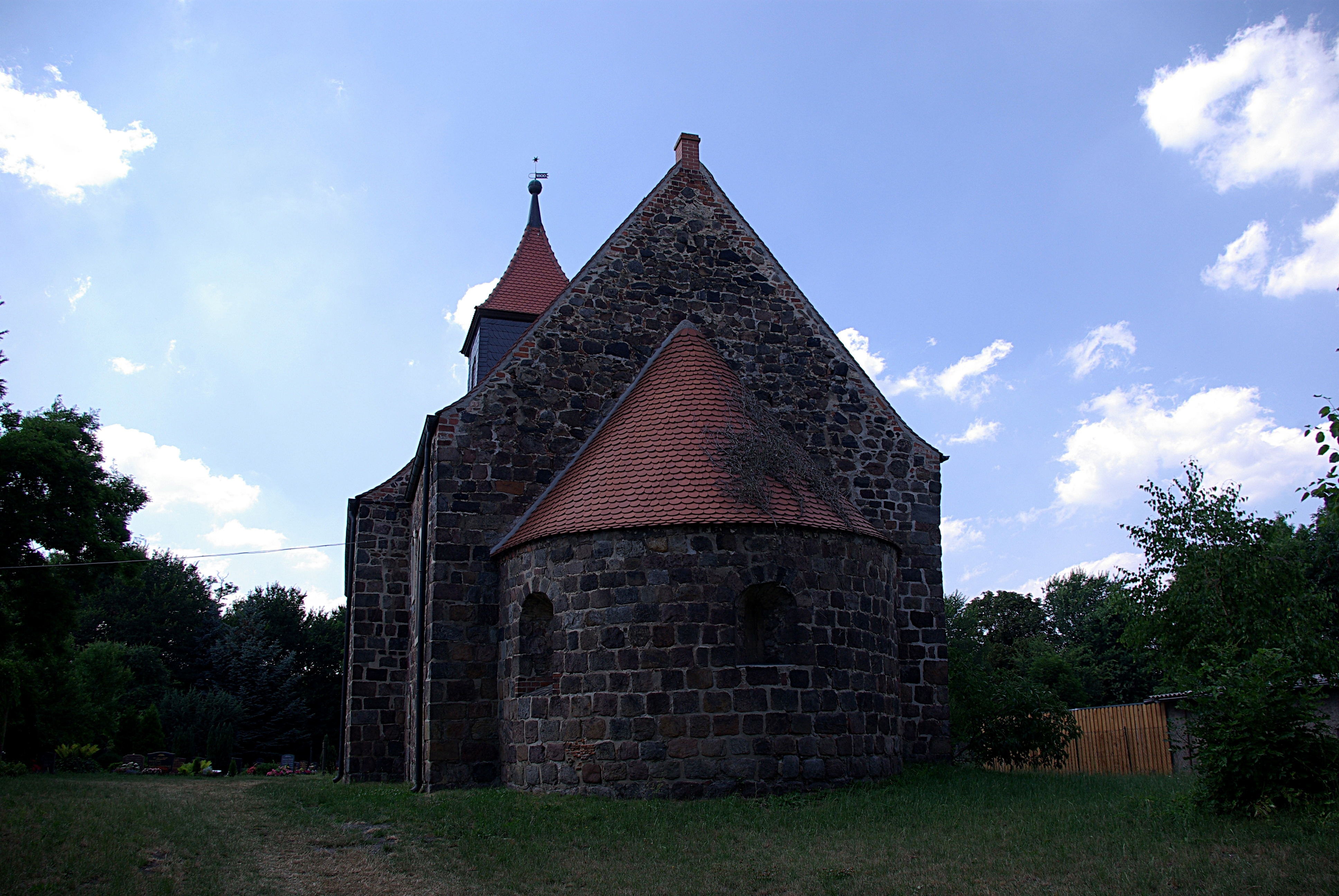 Jüterbog, Ortsteil Neuheim in Brandenburg. Die Kirche stammt im Ursprung aus dem 12. Jahrhundert. Die Kirche steht unter Denkmalschutz.